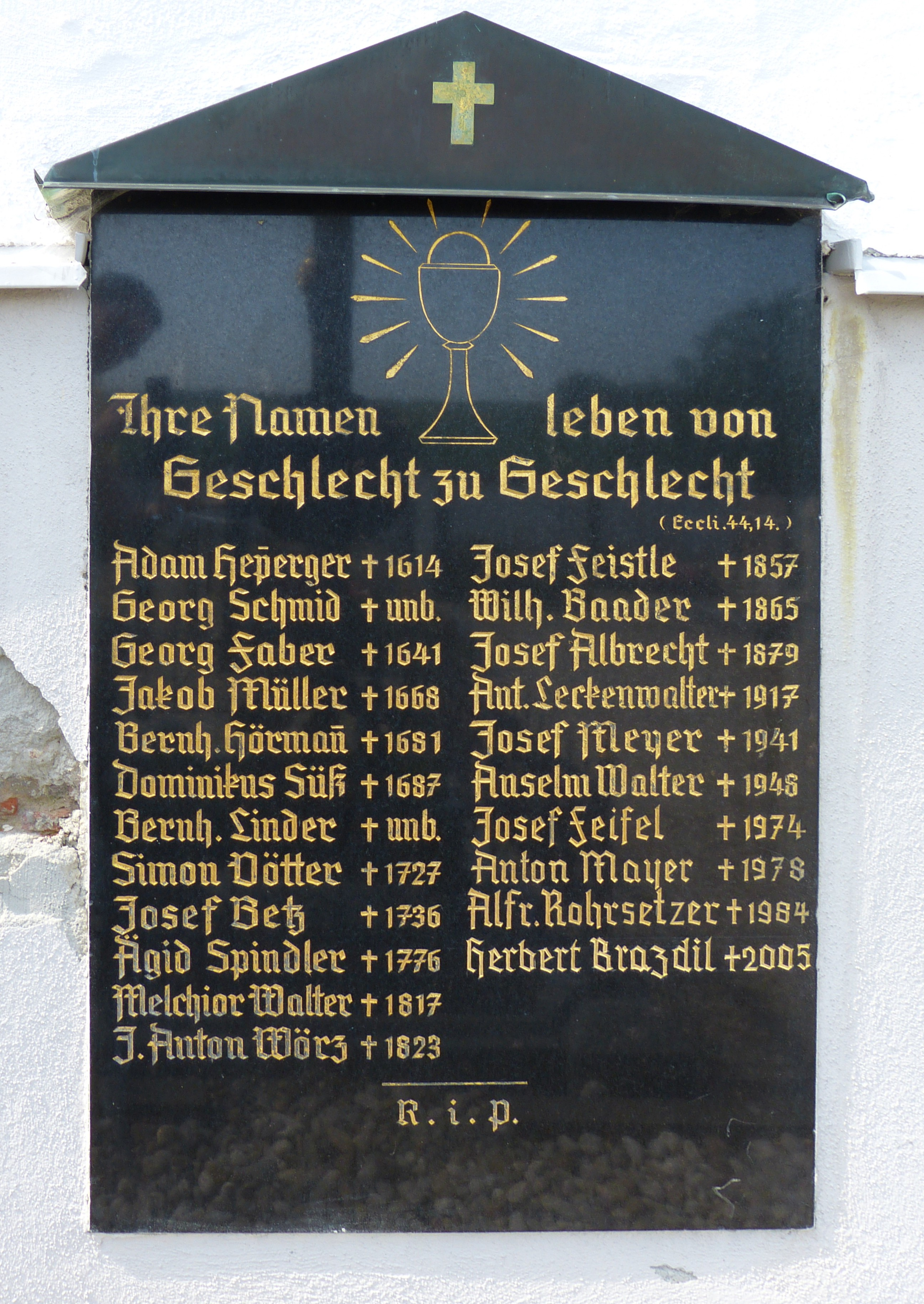 Gedenktafel für die Priester von Mariä Himmelfahrt, Markt Wald (Landkreis Unterallgäu, Bayern)